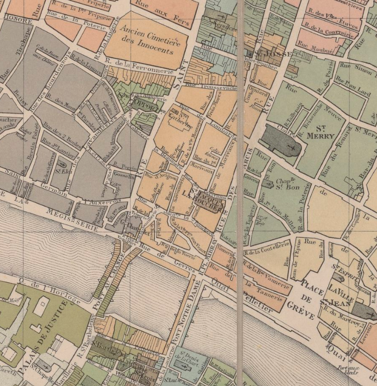 Plan des paroisses de Paris avec la distinction des parties éparses qui en dépendent" par Jean Junié (1786) – Paroisse Saint-Jacques-de-la-Boucherie